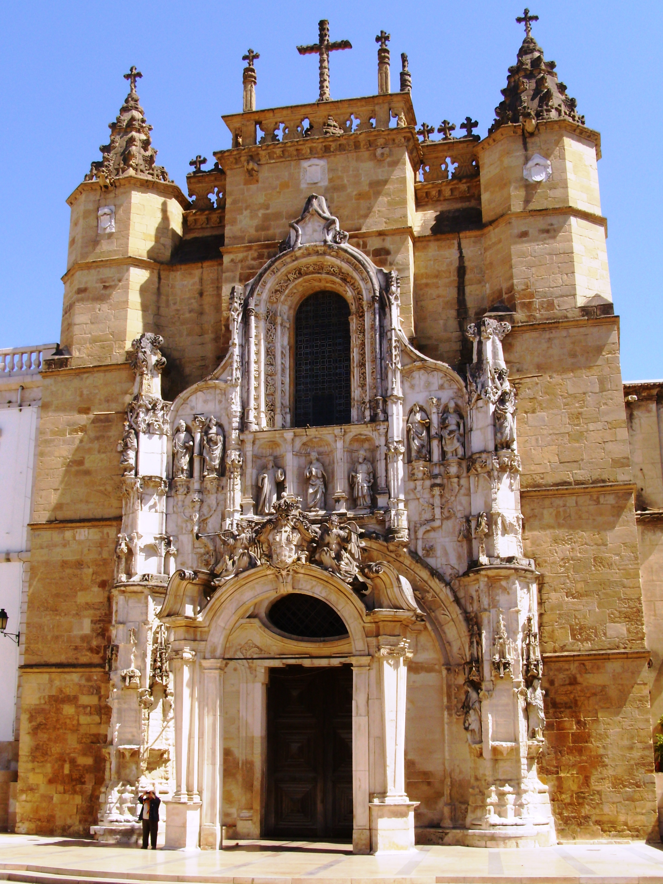 Igreja de Santa Cruz, freguesia de Santa Cruz, concelho e Distrito de Coimbra, Portugal.